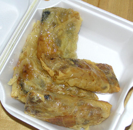 Fried version of dim sum tofu skin roll Tofu Skin roll